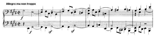 Variation 5 des dritten Satzes aus Beethoven Opus 109